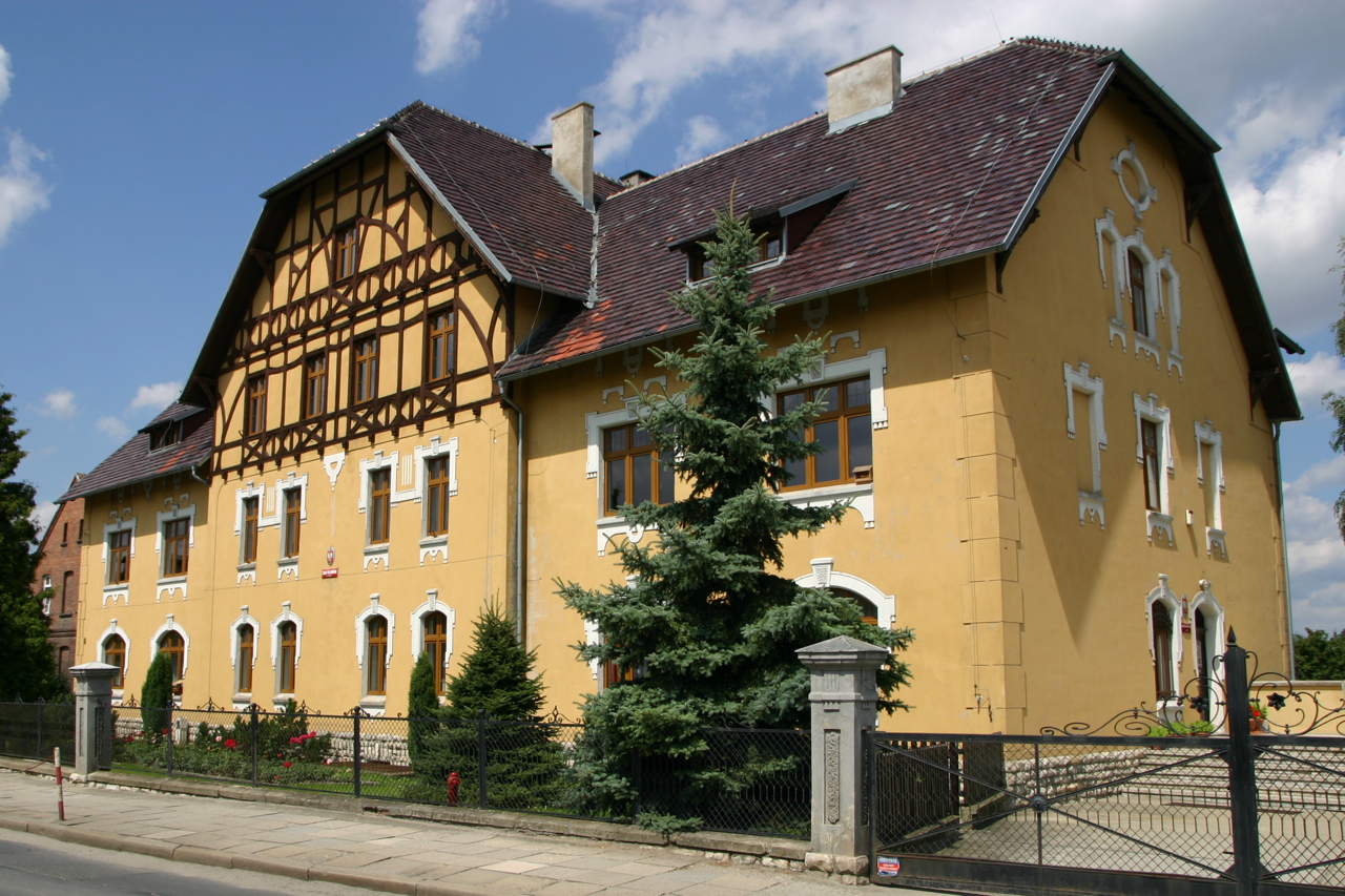 Zielina (dodatkowa nazwa w j. niem. Zellin) – wieś w Polsce położona w województwie opolskim, w powiecie krapkowickim, w gminie Strzeleczki.